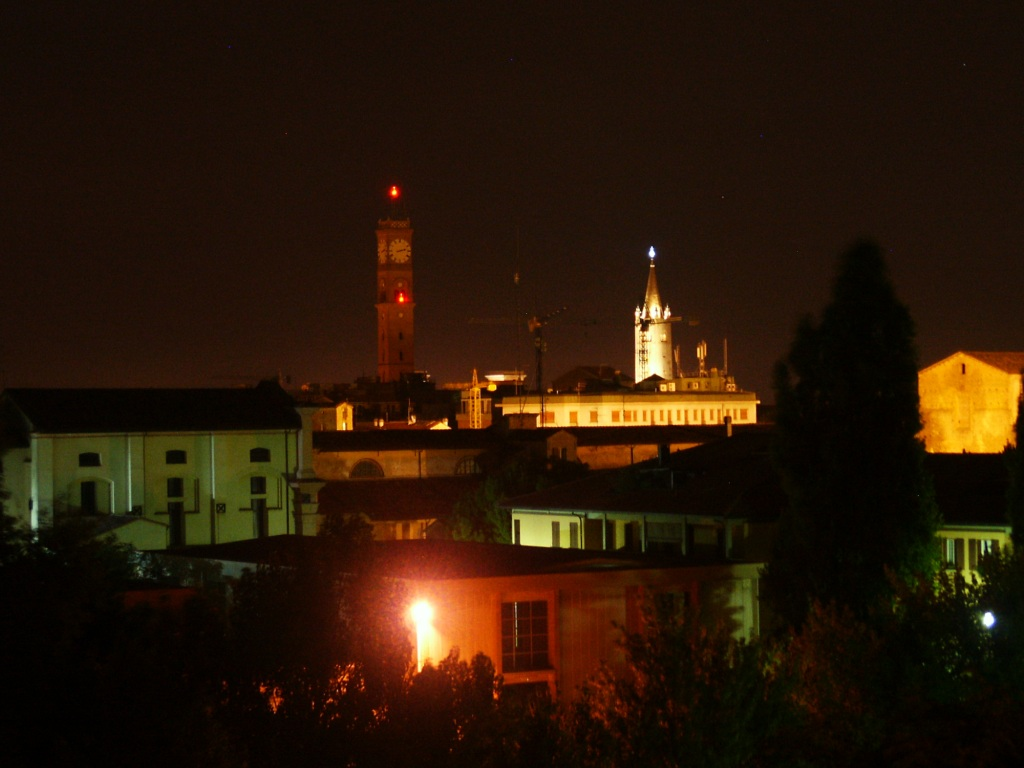 Forlì, Emilia Romagna, Italia